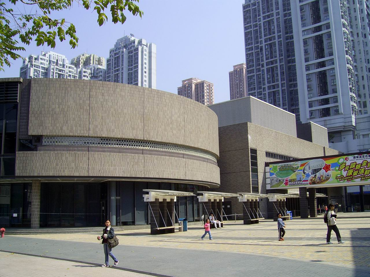 馬鞍山公共圖書館